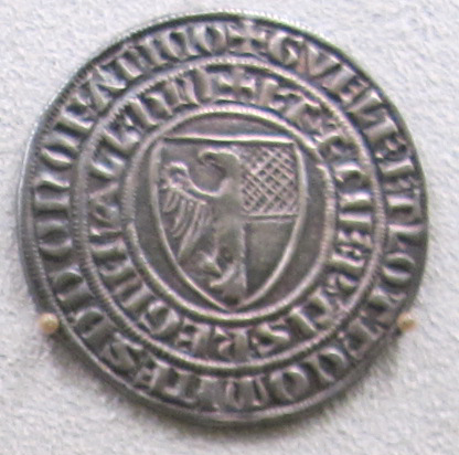 Sardegna, villa di chiesa, grosso tornese, dal 1285